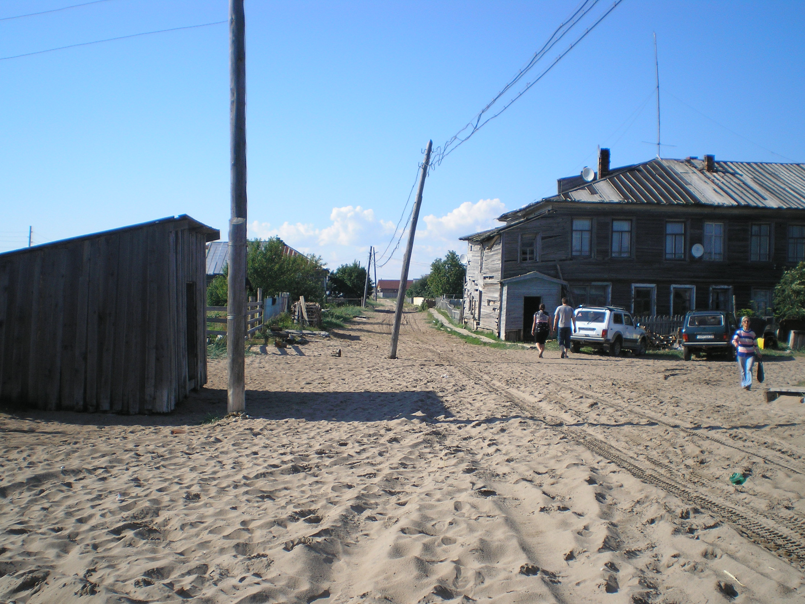 Улица в Кузомени